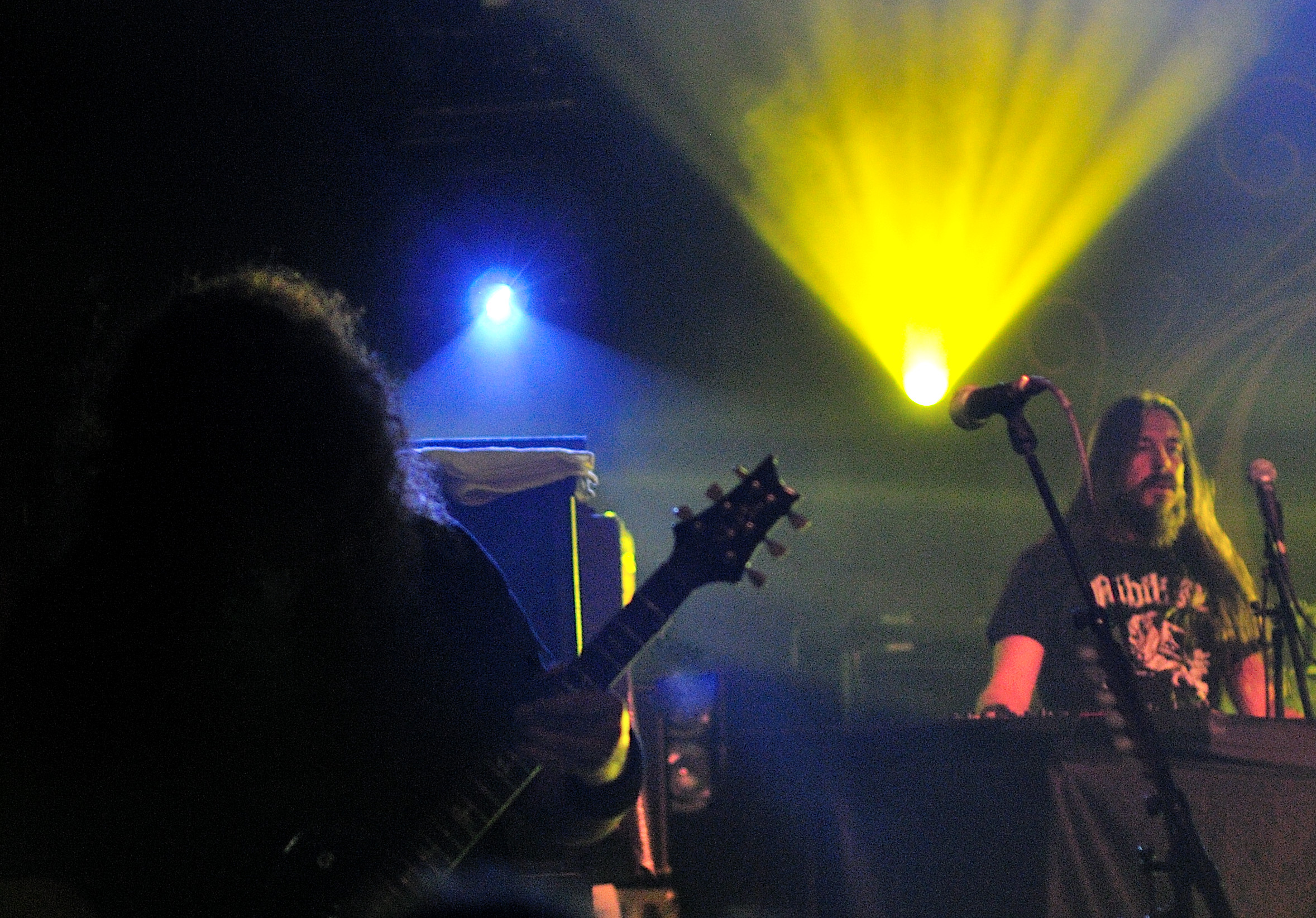 Opeth, Munich Backstage Werk, Saturday 6 December 2008 Fredrik Åkesson